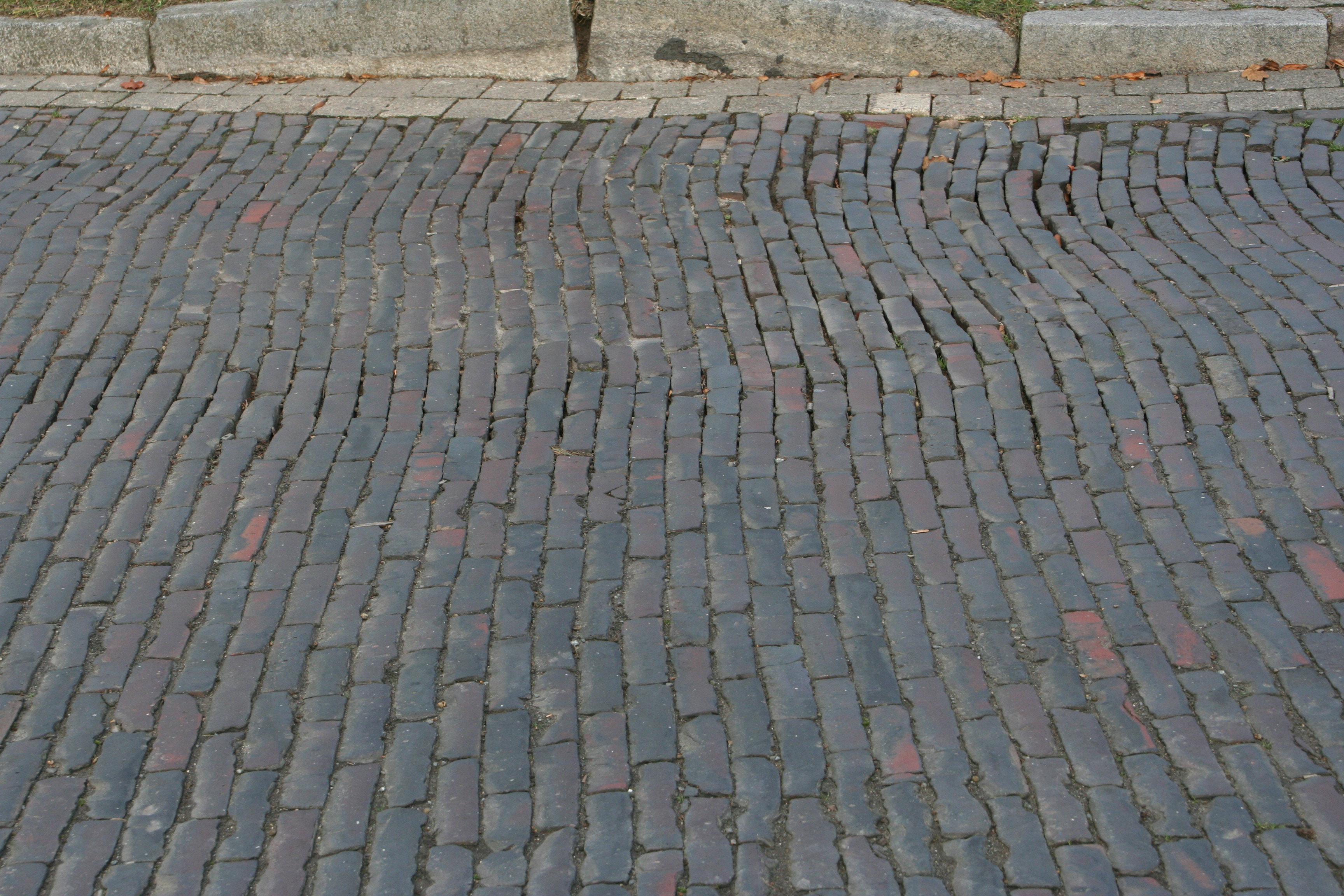 Osterhagen-Ihlpohl, Am Denkmal: Pflaster. Torfbrandziegel